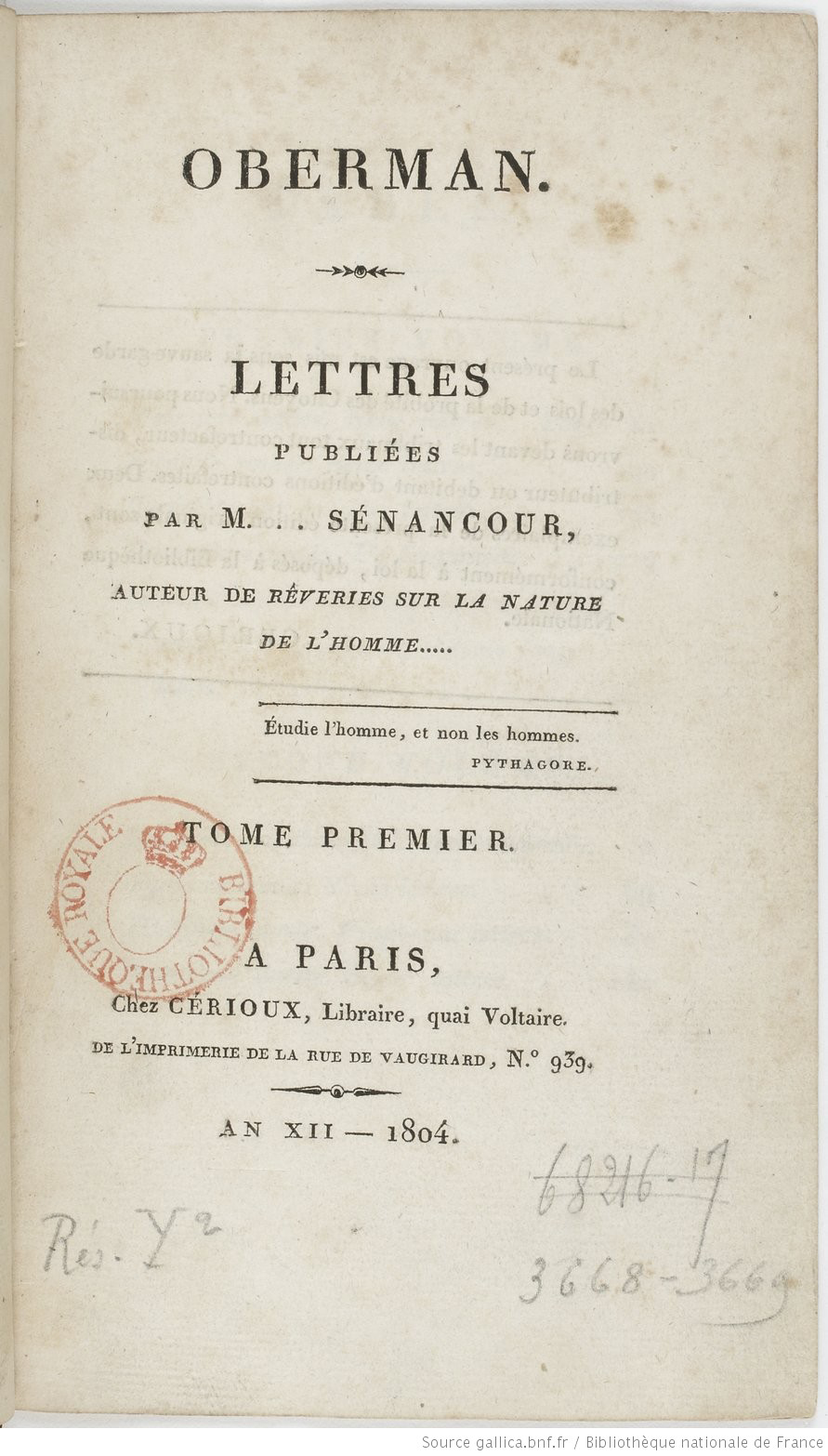 Oberman